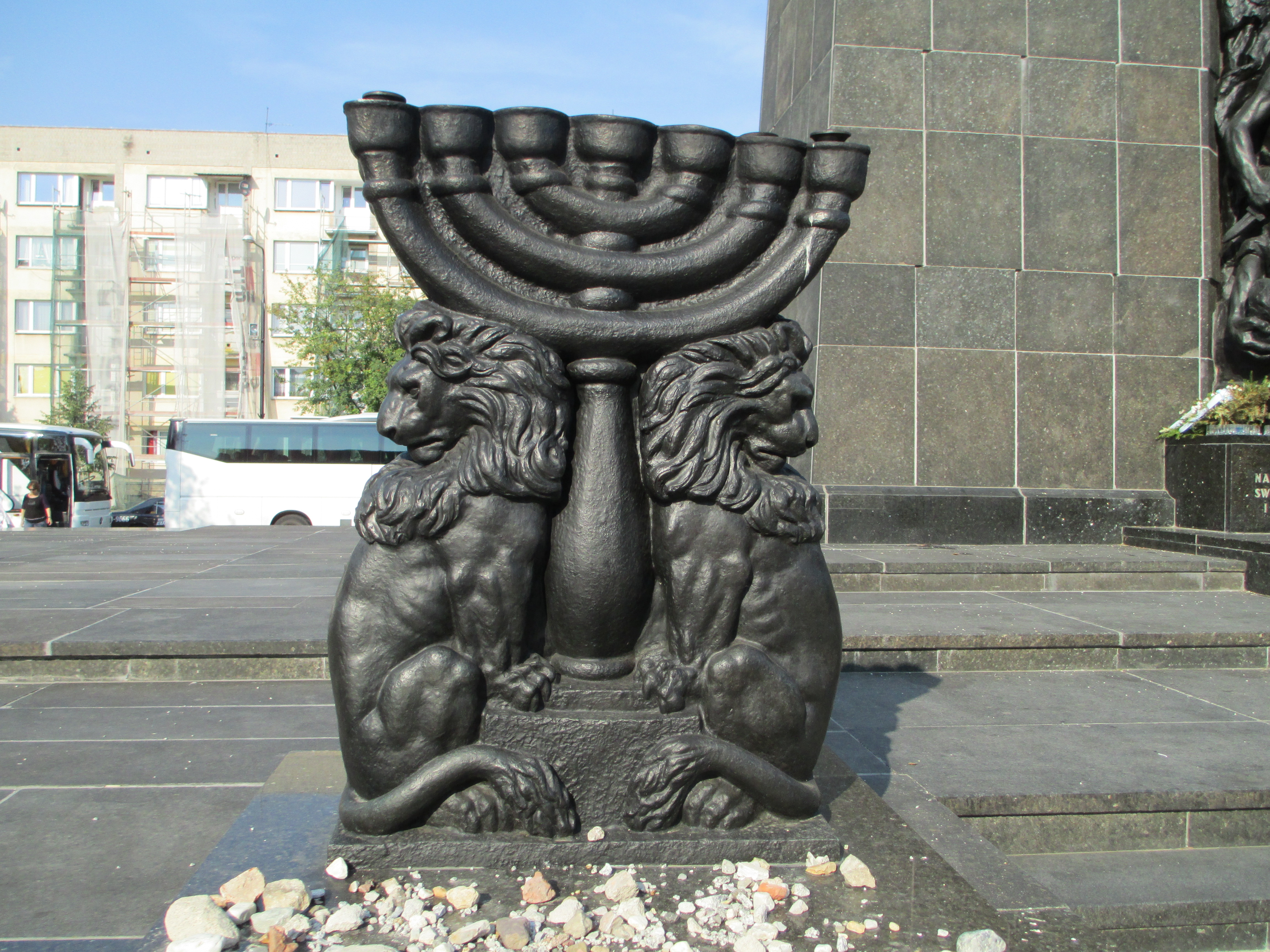 פסל מנורה ואריות בצד אנדרטת מרד גטו ורשה, בוורשה